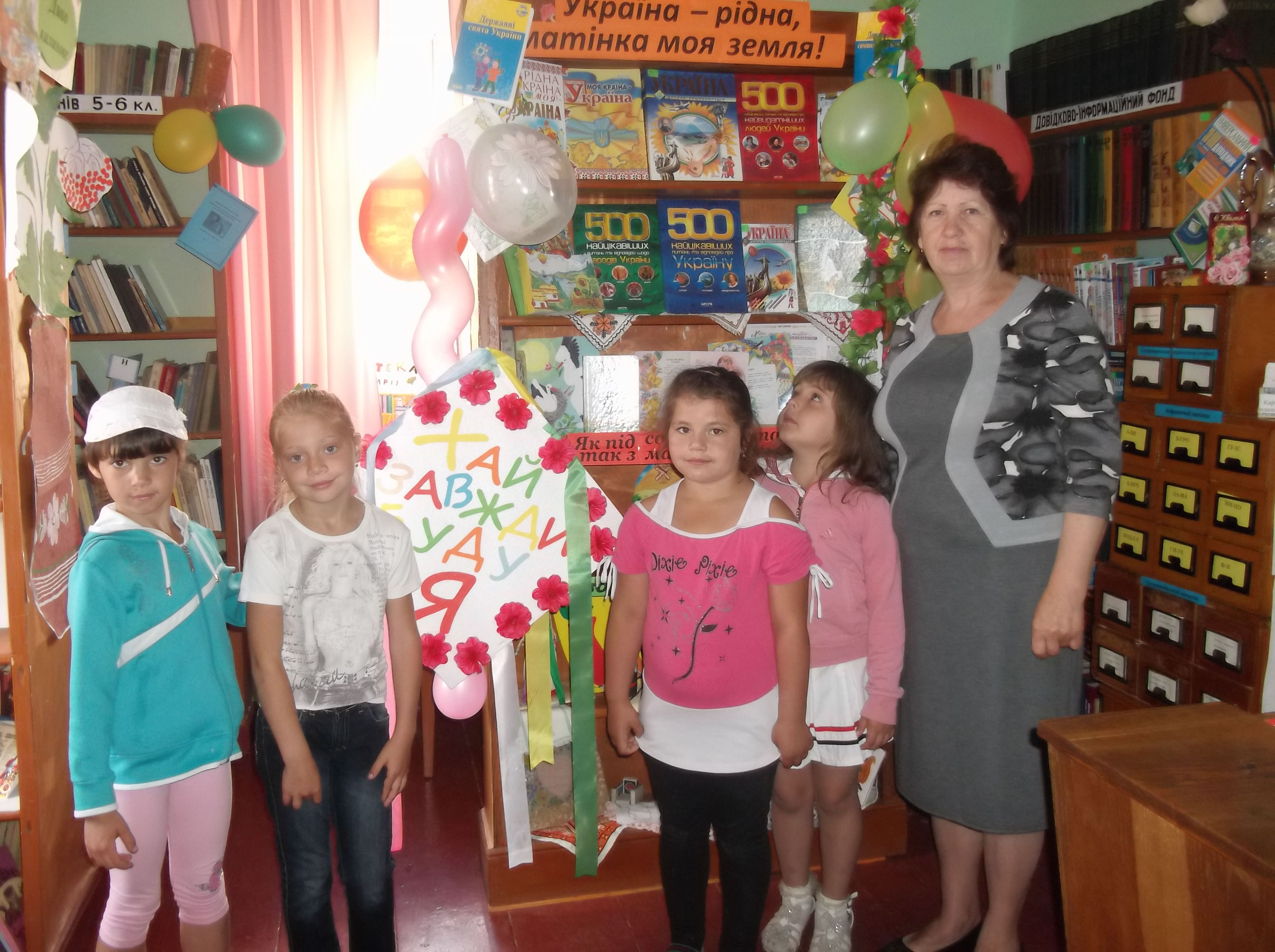 Свято в бібліотеці " Хай завжди буду я"